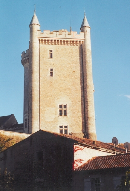 Date : 9 octobre 2004, vers 18 h 30 Source : photo personnelle d'archeos Description : Donjon du château-église de Morthemer dans la Vienne, prise du chemin pentu situé à l'ouest Autres descripteurs : tourelle d'angle ; merlon ; machicoulis ; créneau ; croisée ; meneau ; meurtrière ; château fort Licence